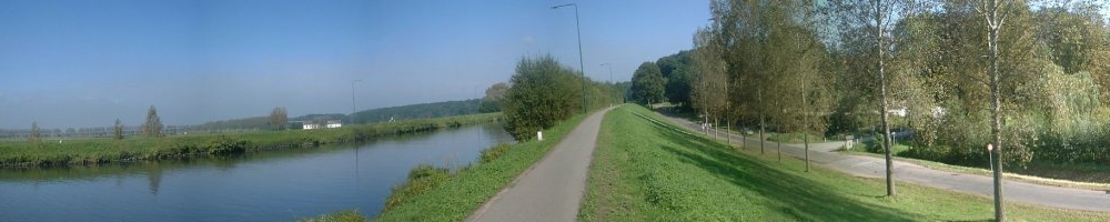 Eigen foto.